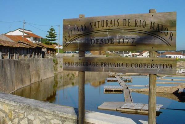 Placa Indicativa das Salinas